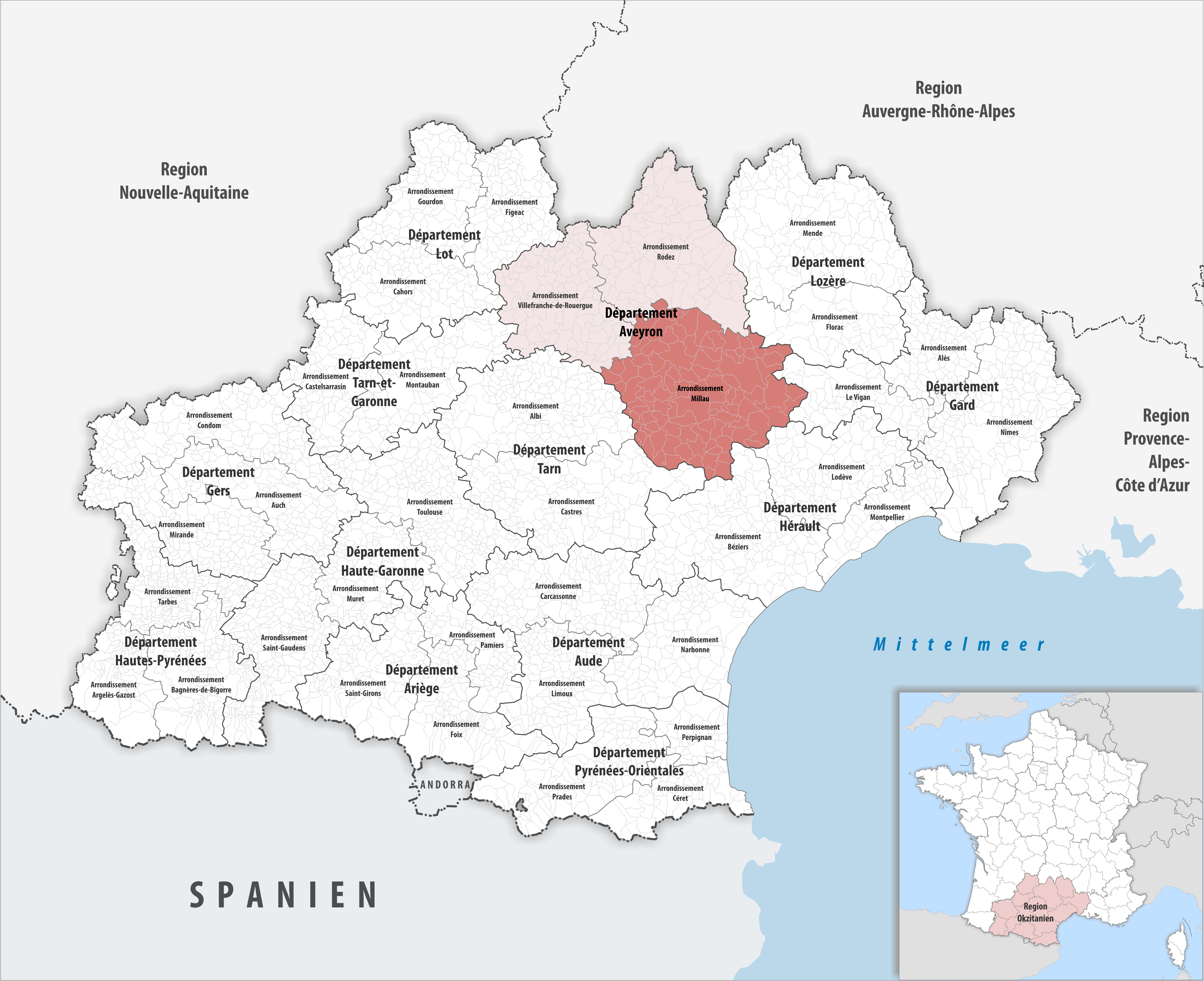 Lage des Arrondissements Millau